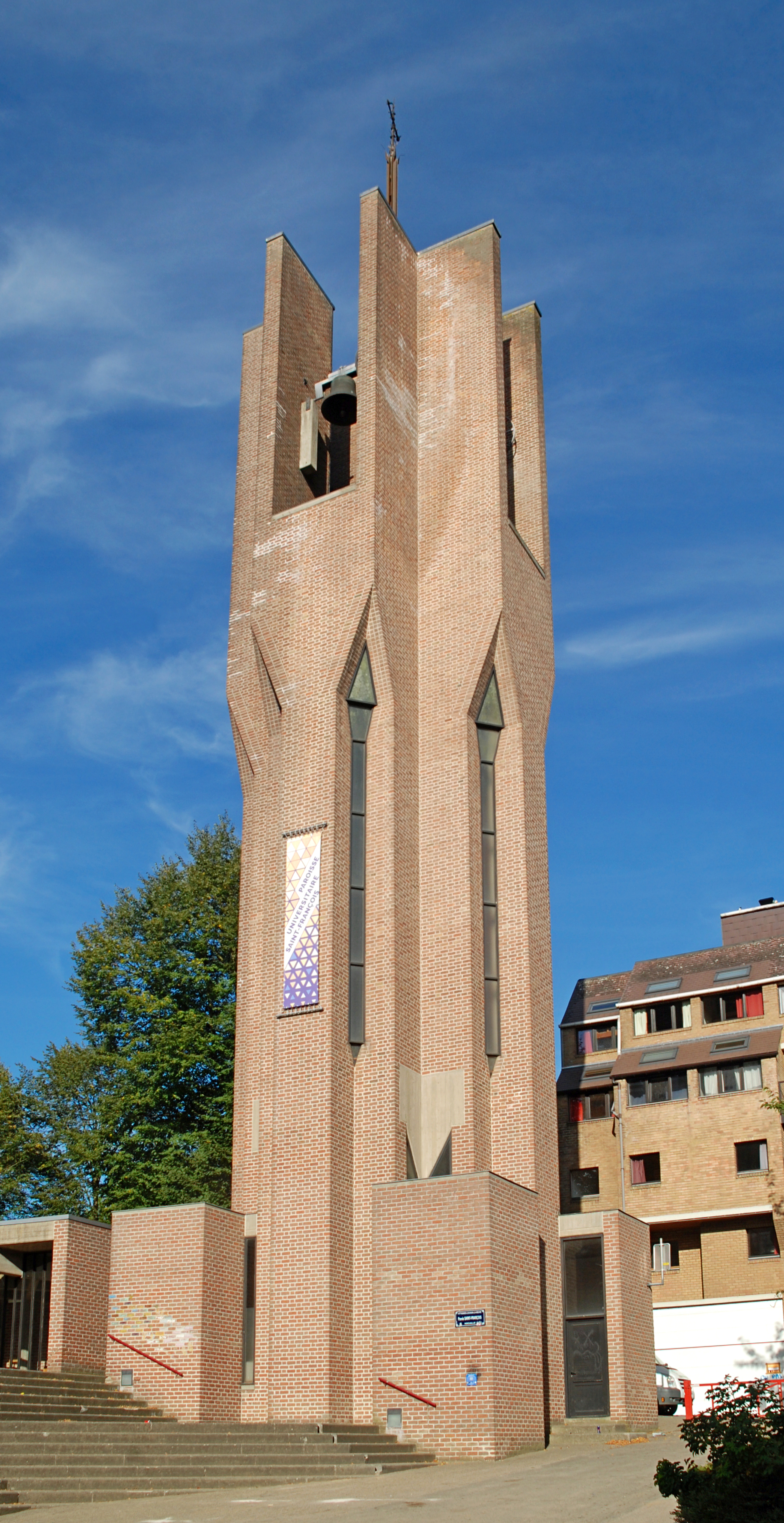 Belgique - Brabant wallon - Louvain-la-Neuve - Église Saint-François d'Assise (architecture brutaliste, architecte Jean Cosse)